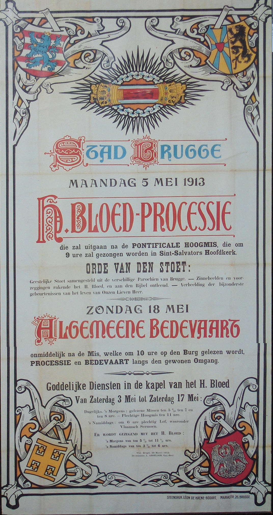 Affiche van de H. Bloedprocessie te Brugge, mei 1913; steendruk; uitgever : Léon De Haene-Bodart, Brugge; privécollectie